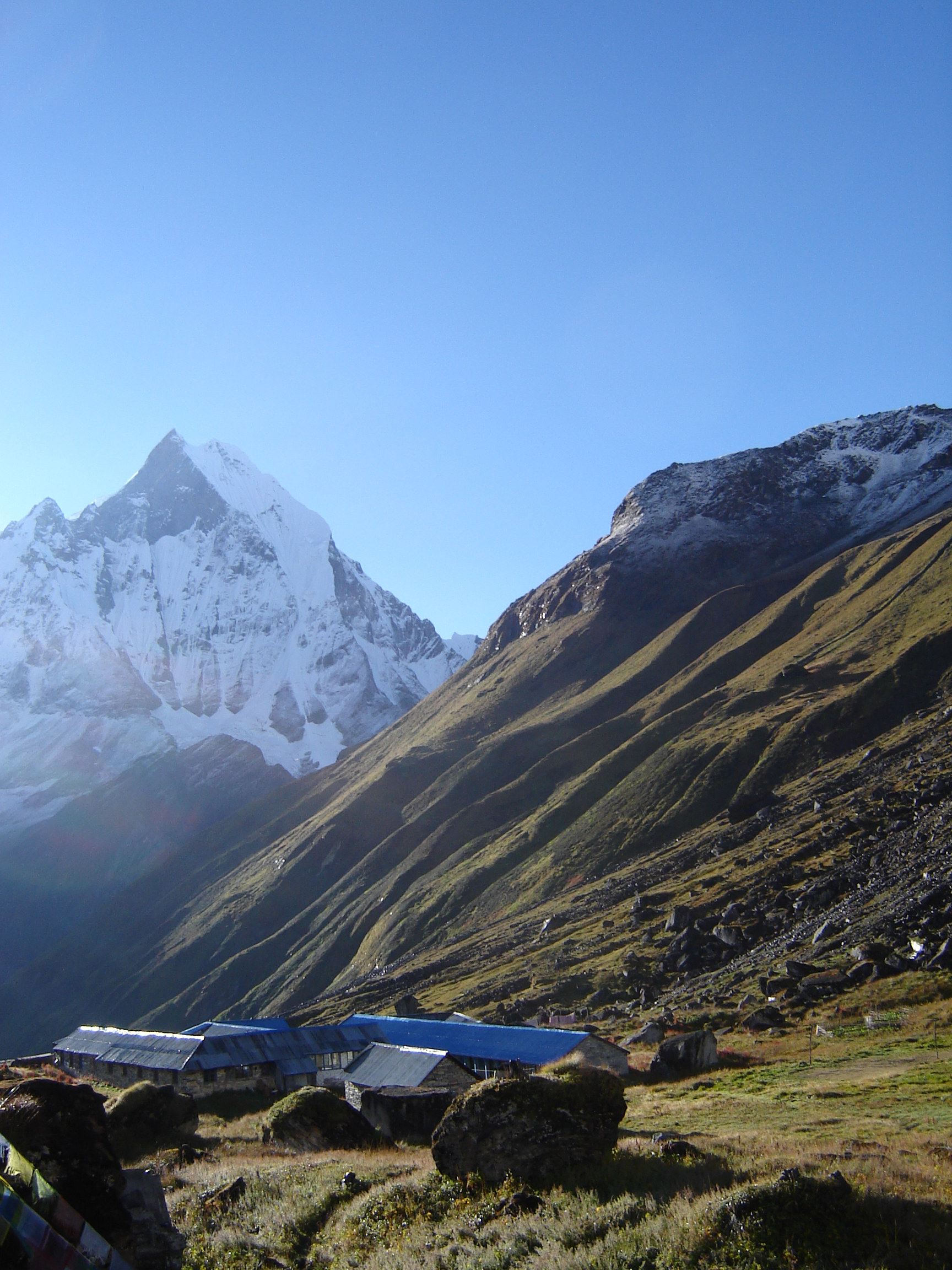 Baza u stóp południowego zbocza Annapurny i Machapuchare (6993 m). Widok od strony zachodniej.